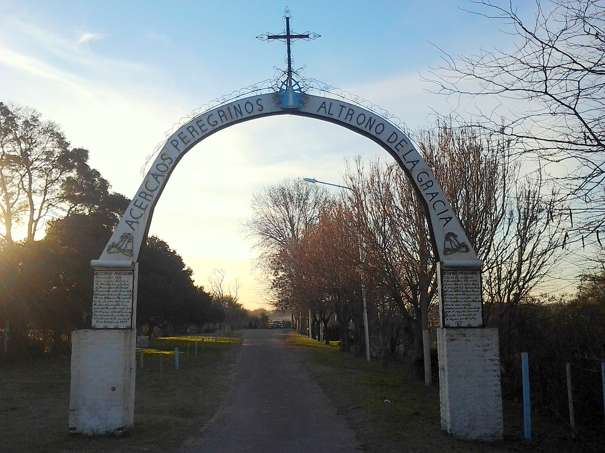 El Lugar del Milagro de la Virgen de Luján Zelaya, Partido del Pilar, Provincia de Buenos Aires. Entrada al oratorio que recuerda el Milagro de la Virgen de Luján en el año 1630, en esa Histórica localidad Pilarense.